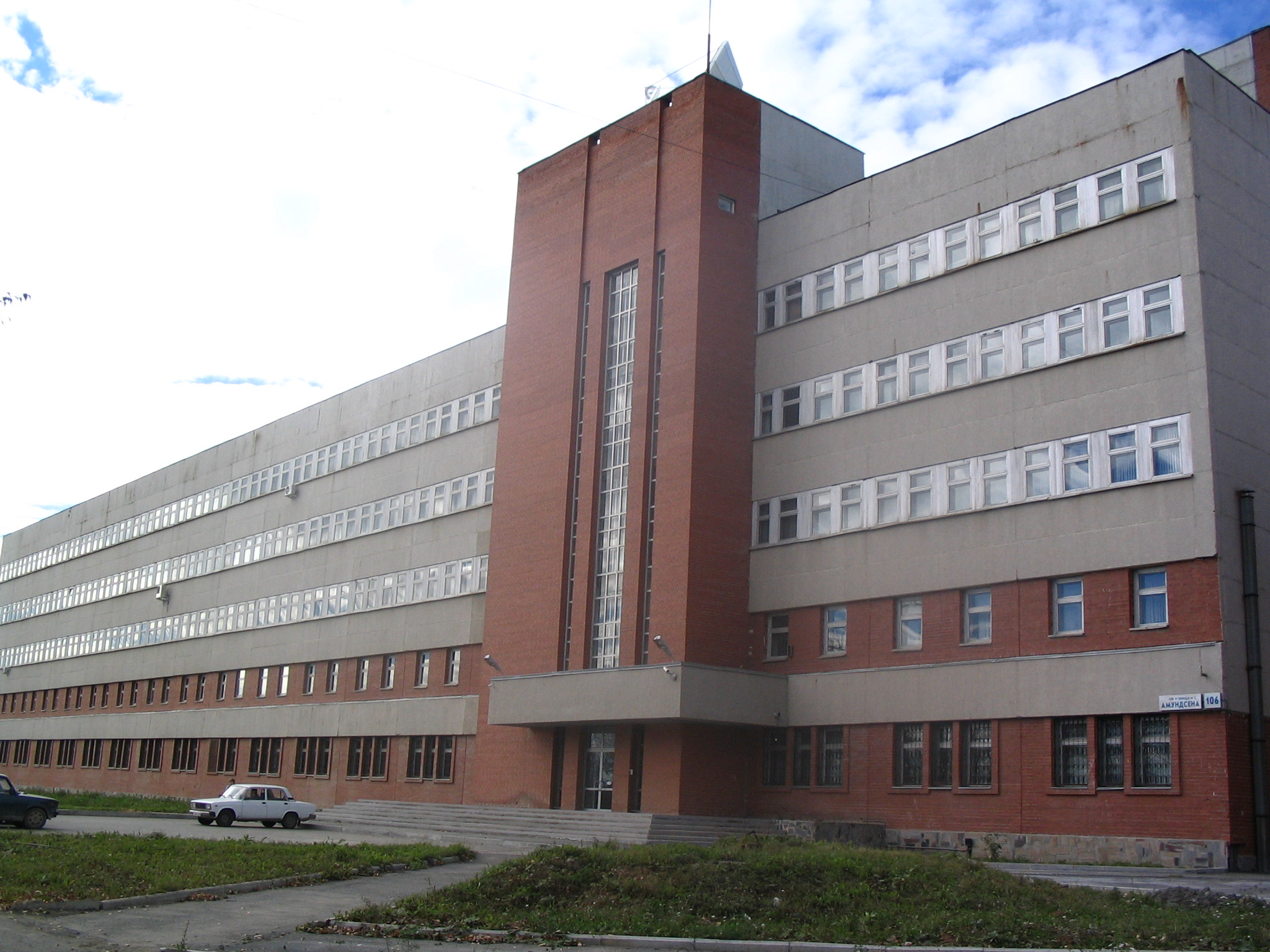 здание института электрофизики УрО РАН